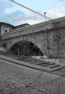 Direcciòn salida a la Avenida Universidad (Mèrida-Venezuela)